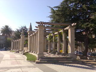 Bouzas Vigo